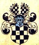 Johann Siebmacher: New Wappenbuch eingescannt aus: Horst Appuhn (Hrsg.), Johann Siebmachers Wappenbuch. Die bibliophilen Taschenbücher 538, 2. verb. Aufl , Dortmund 1989 Elsässer Blatt 95